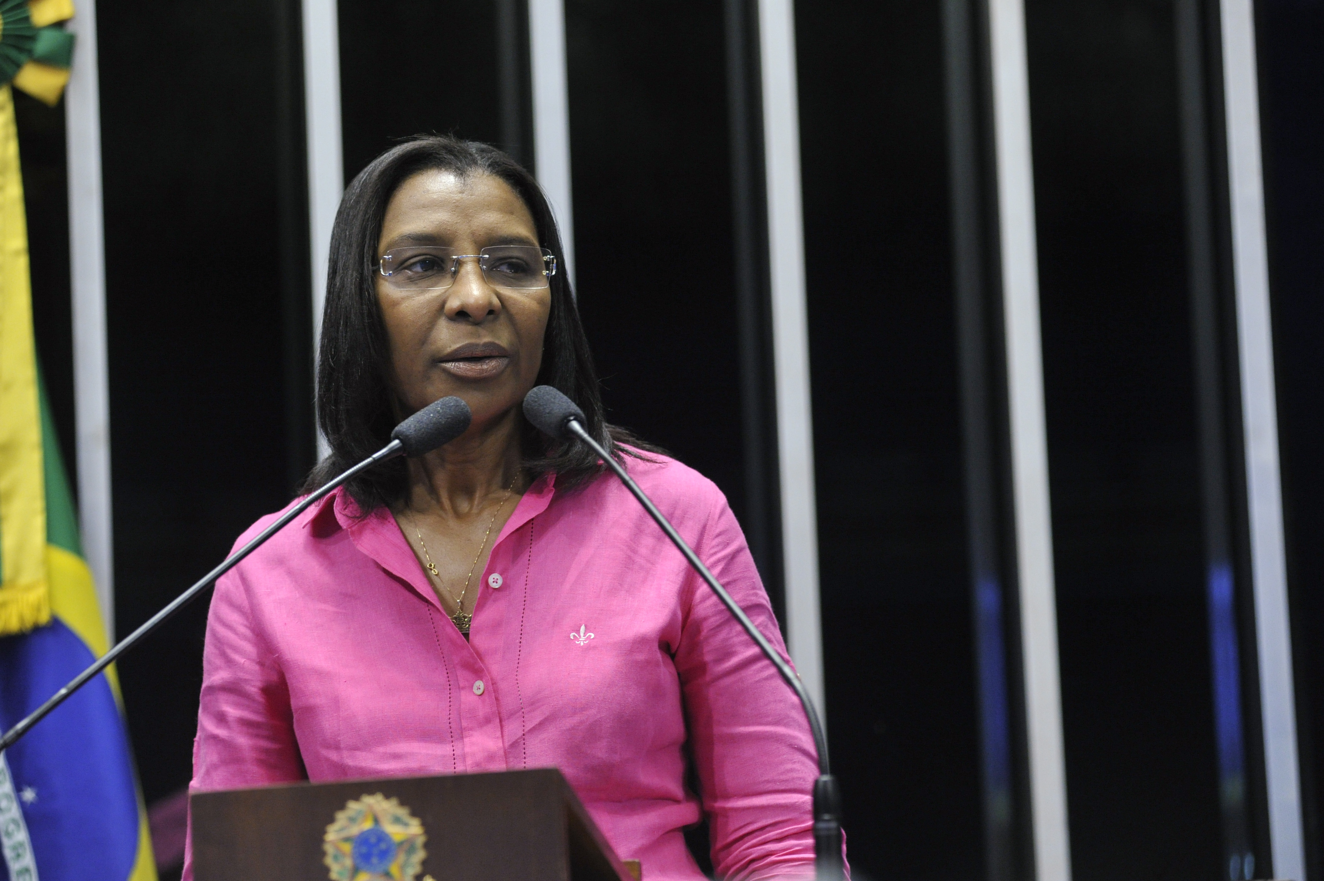 Plenário do Senado Federal durante sessão especial destinada à entrega do Prêmio Jornalista Roberto Marinho de Mérito Jornalístico. Em discurso na tribuna, deputada federal Rosangela Gomes (PRB-RJ). Foto: Geraldo Magela/Agência Senado